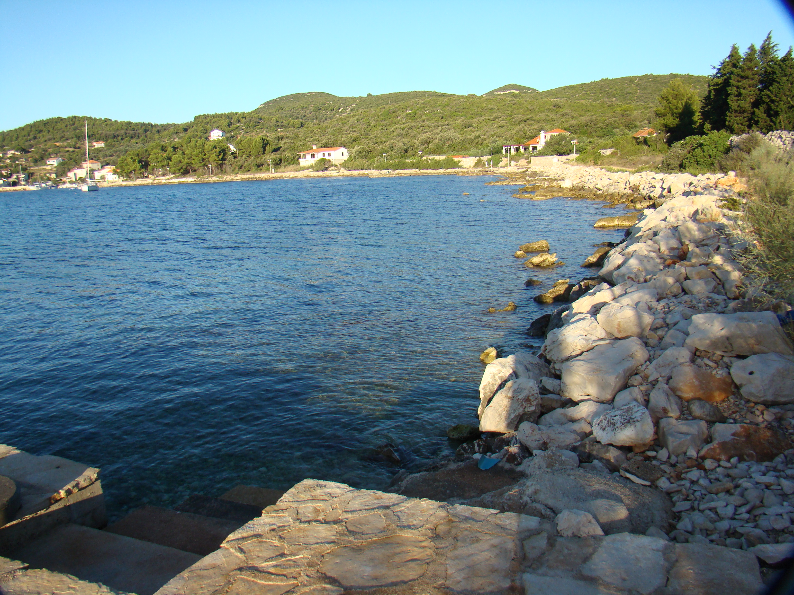 žman08